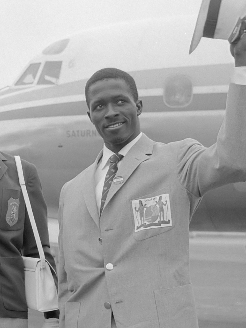 Vertrek van de heer Van Houten , W. Essajas en F. Blankers naar Rome, v.l.n.r. de heer Van Houten, Fanny Blankers-Koen en W. Essajas 24 augustus 1960